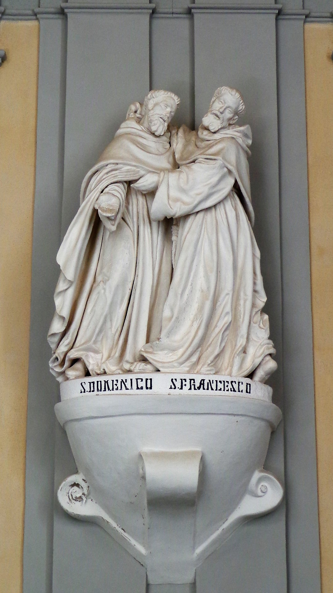 Scultura raffigurante San Domenico e San Francesco di Cristoforo Milanti.